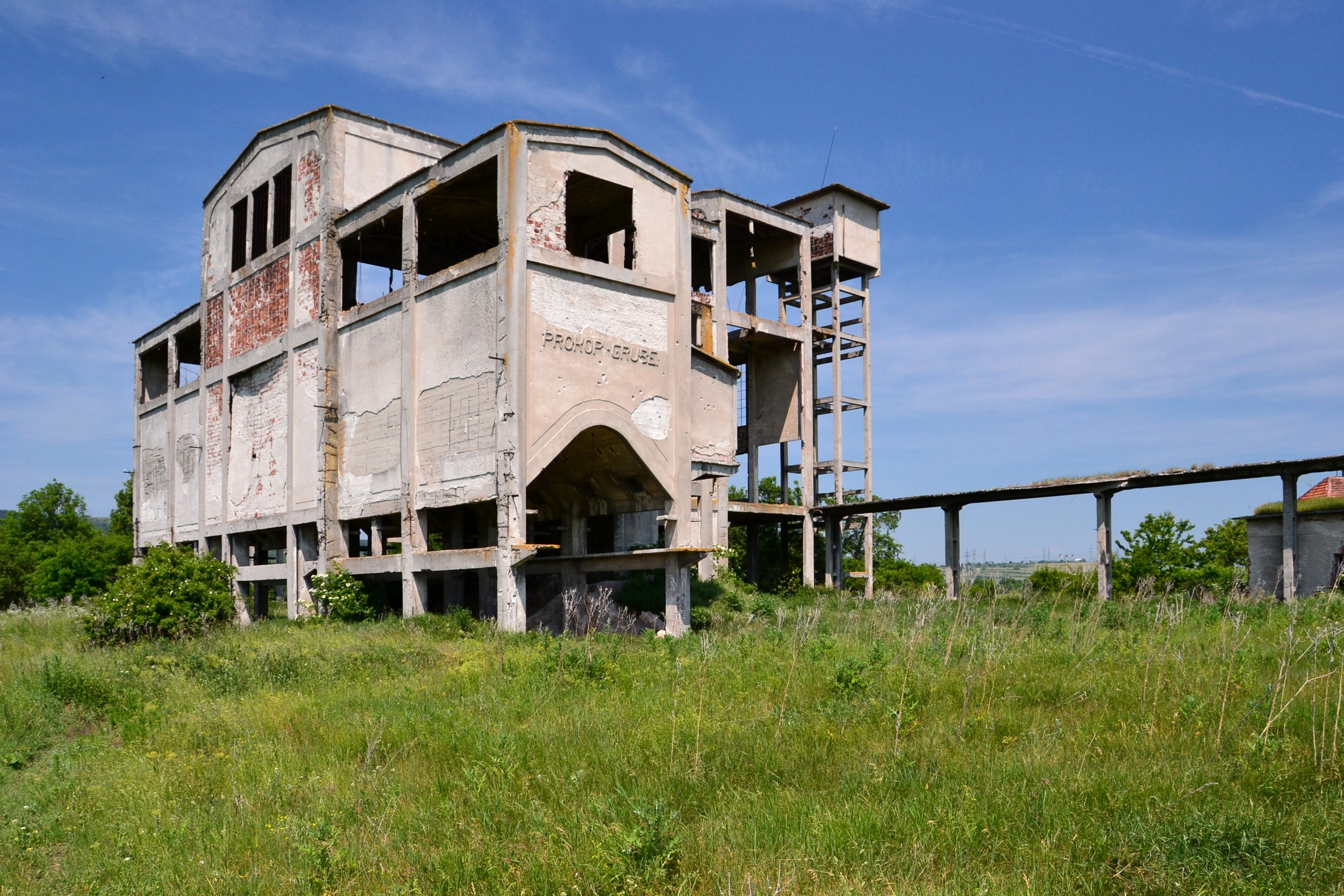 Budova třídírny uhlí Prokop Grube